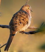 foto em fazenda na cidade de uniao-piaui